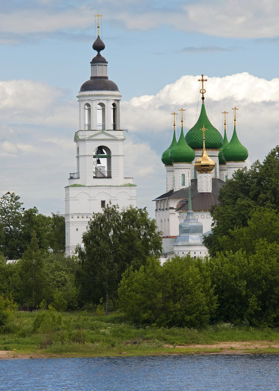 Tolga convent